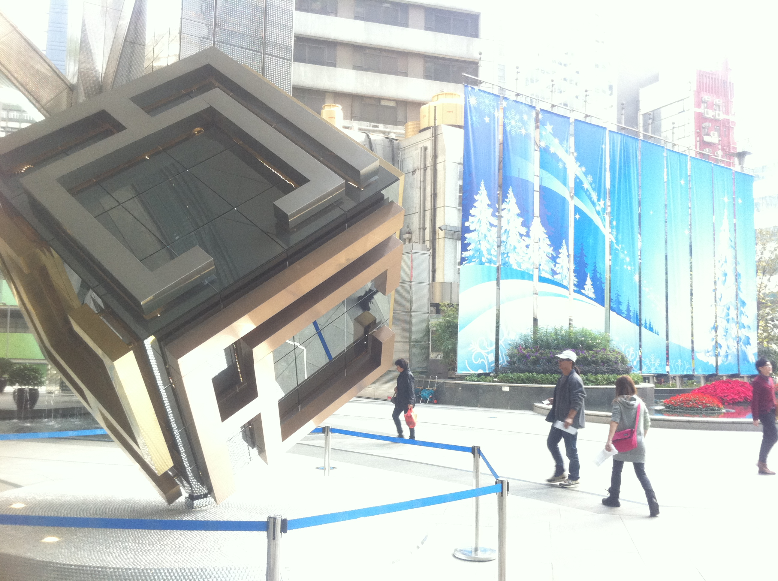 中文（香港）: 新界大圍zh:名城盛世 Logo 在zh:香港島zh:中環中心